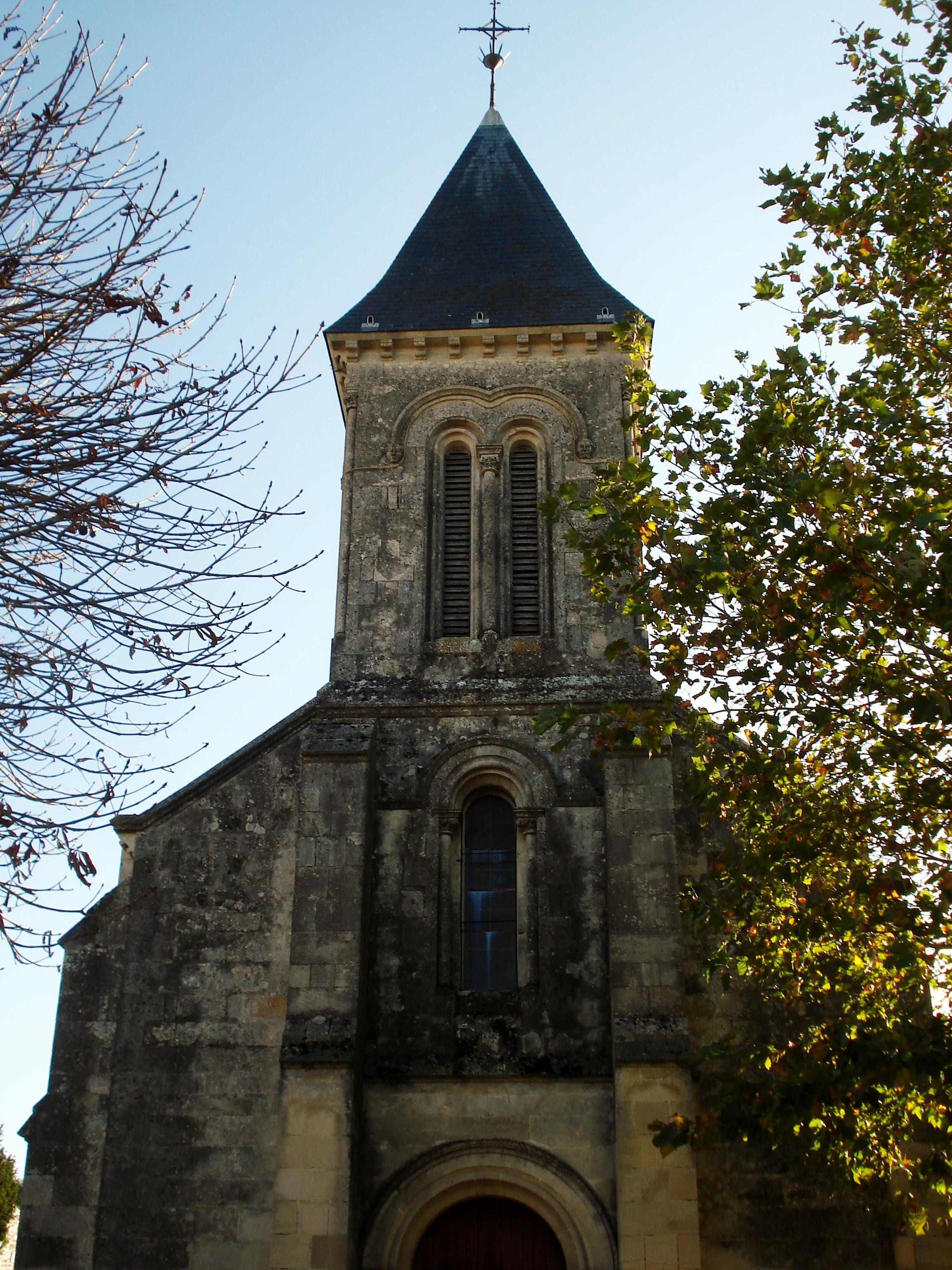 Eglise de Loiré-sur-Nie en Charente-Maritime